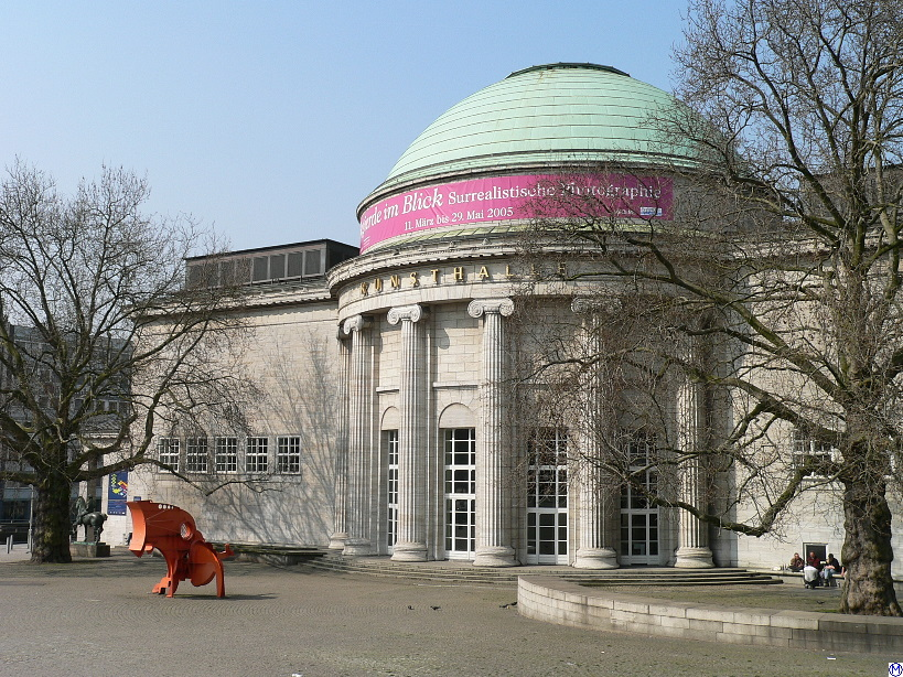 Hamburger Kunsthalle, Kuppelanbau (04.2005) Sculpture "Zyklop"(1974) by Bernhard Luginbühl in Hamburg/Germany This is a photograph of an architectural monument.